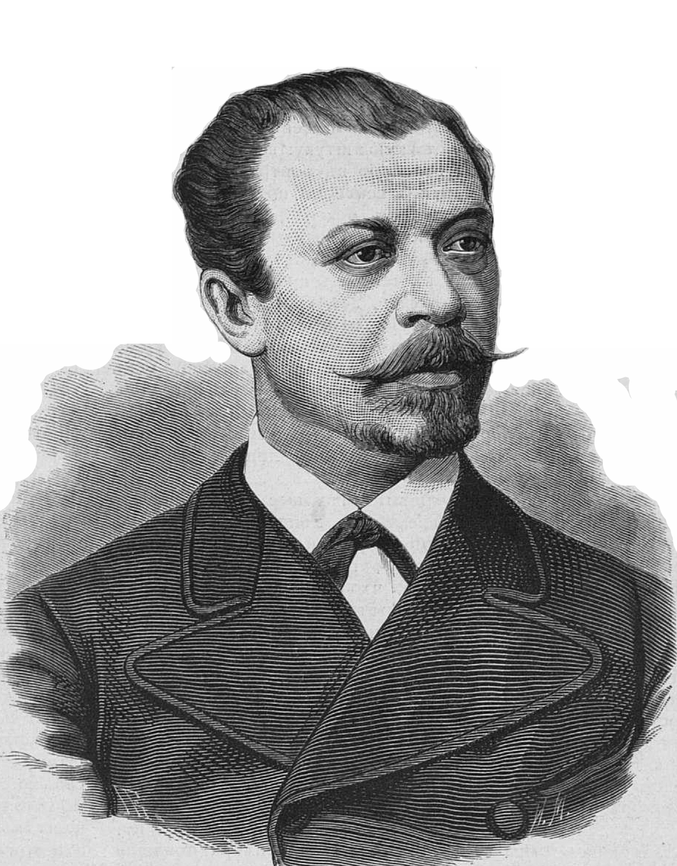 Генерал-майор Черняев Михаил Григорьевич, 1876 год